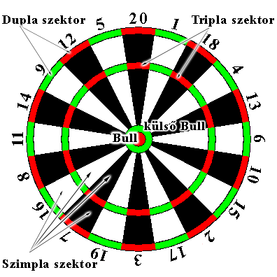 saját kép